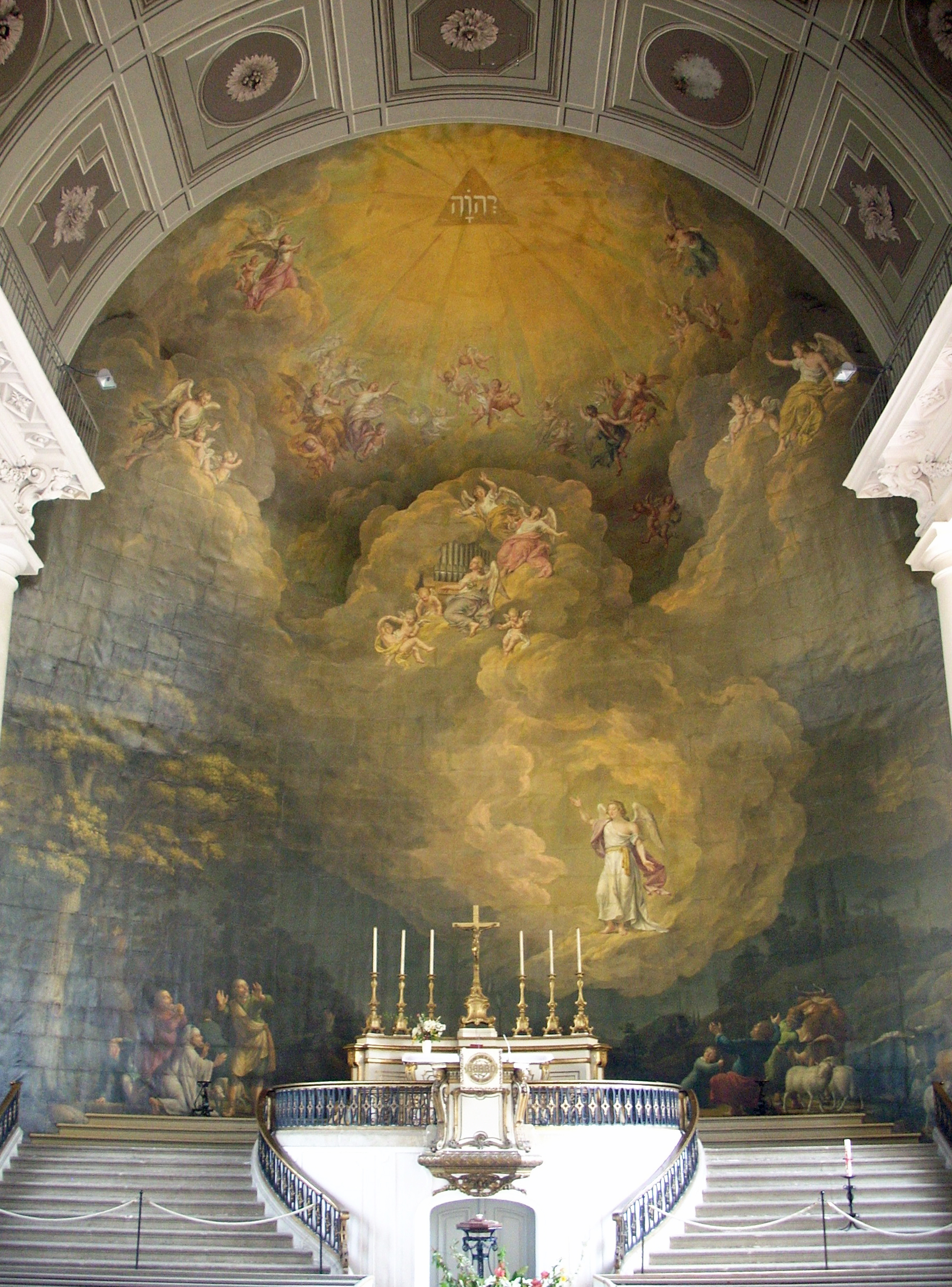 Ludwigslust, ehem. Hofkirche, Altarwandgemälde: Verkündigung der Geburt Jesu an die Hirten von Betlehem